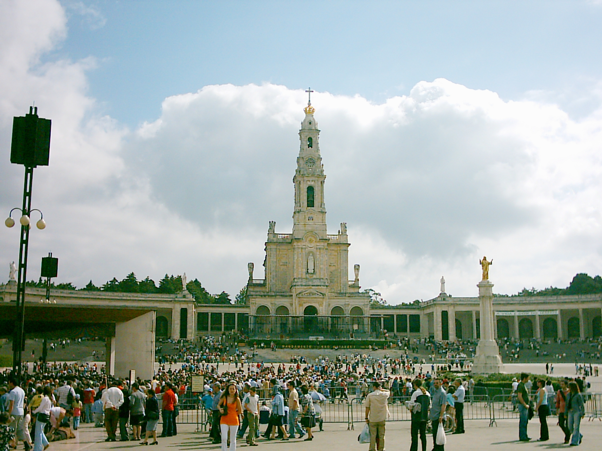 Sanctuaire de Fatima au Portugal